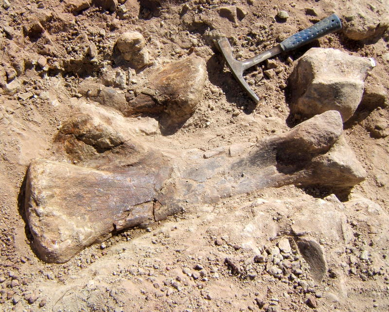 Reperto fossile titanosauride, scavato in Patagonia del nord dalla Rete dei Musei naturalistici Pangea